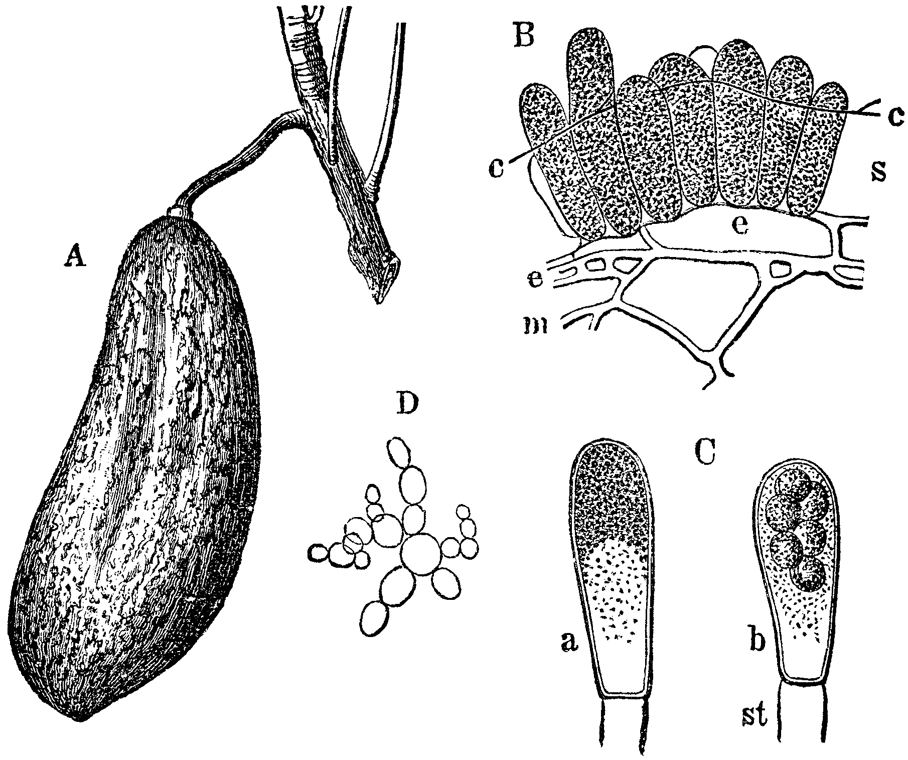 Slika 338. Rožičevec. (Exoáscus prúni.) [sic!]